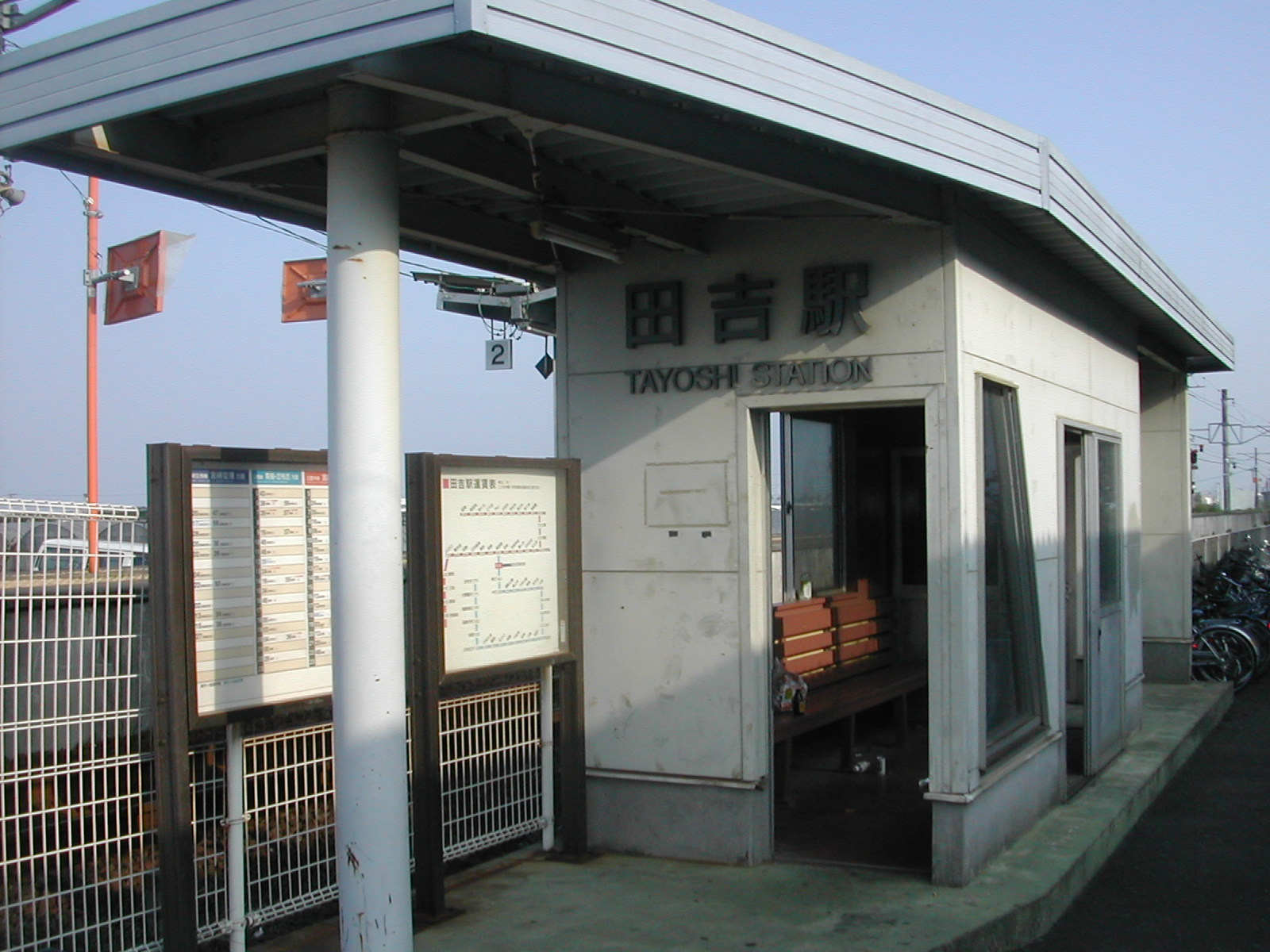 田吉駅。2005年8月29日、利用者:Sea of Japanによる撮影。